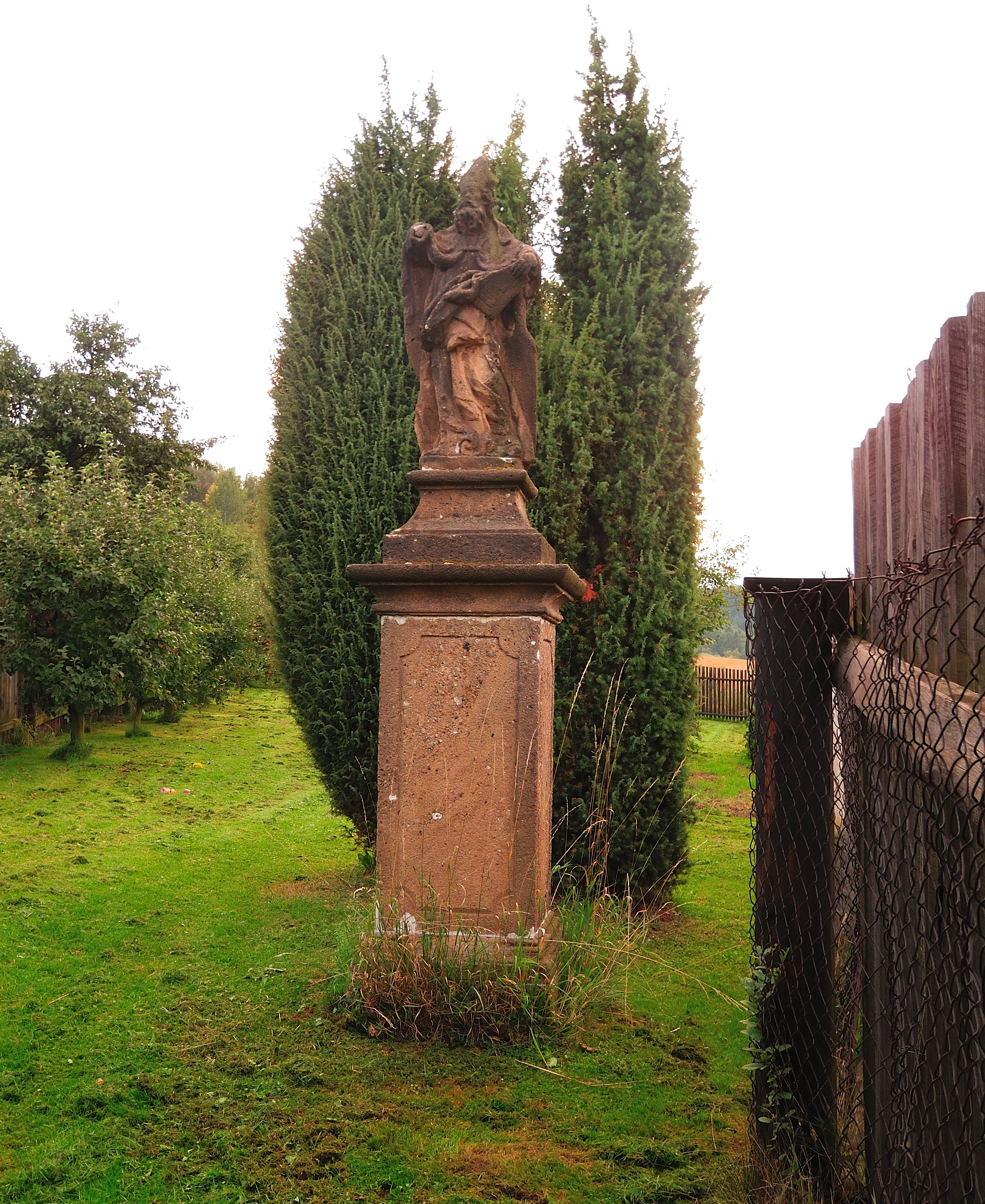 Socha svatého Vojtěcha, Lhota pod Džbánem, okres Rakovník.